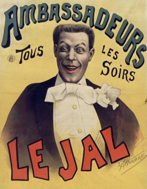 Portrait du chansonnier Victor Lejal.